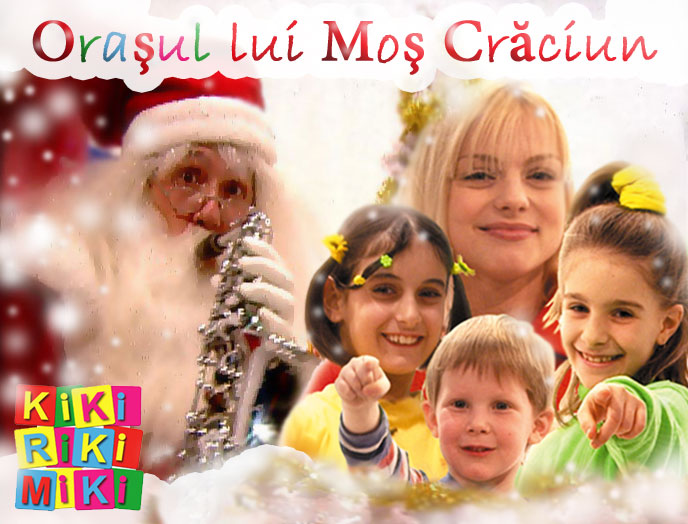 Poster al emisiunii KIKI RIKI MIKI in "Orașul lui Mos Crăciun" - 1999 in imagine: Mos Craciun, Jojo si copiii moderatori: Bubu, Dodo, Sabrina.